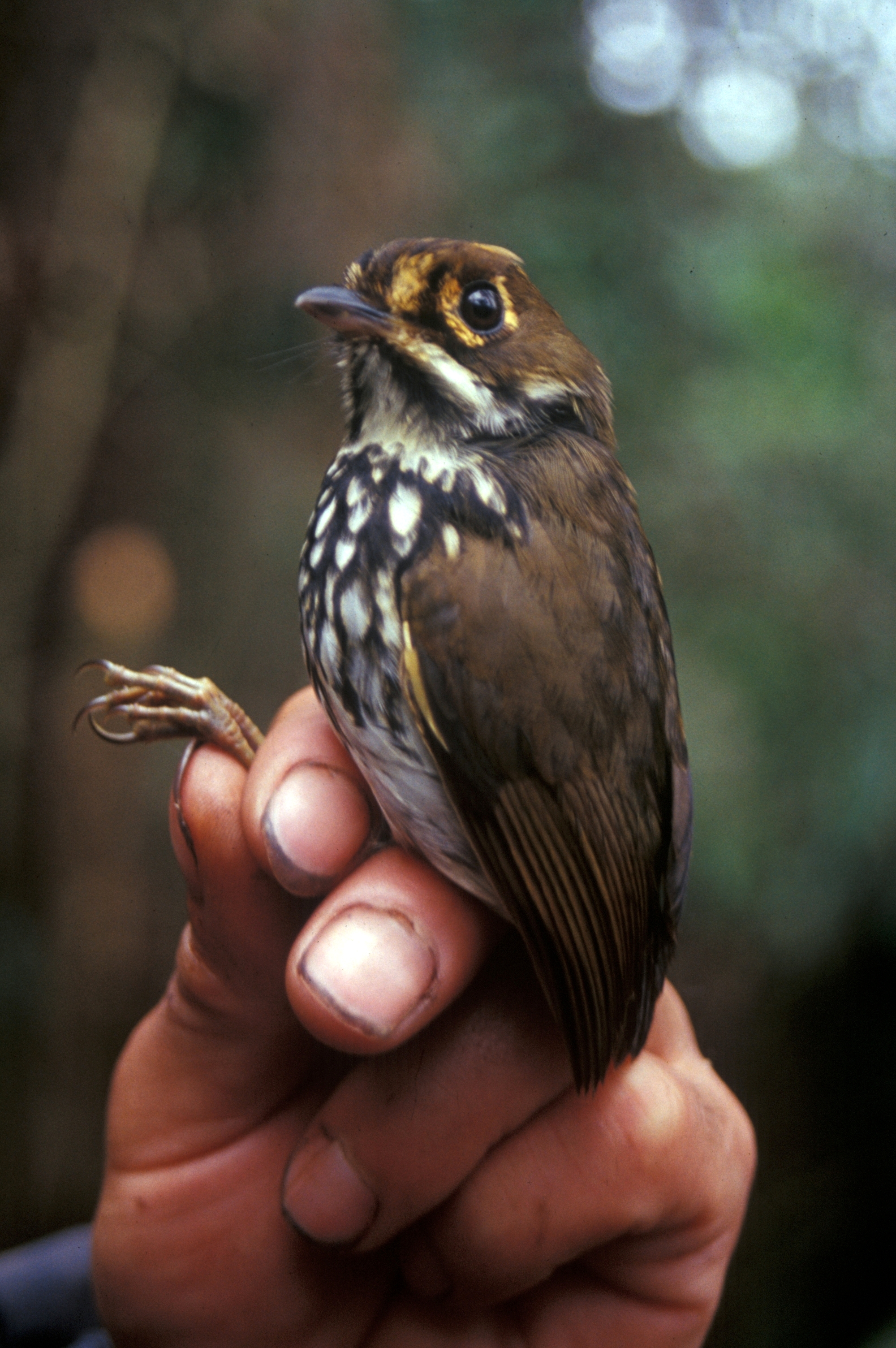 Peruvian Antpitta (Grallaricula peruviana) from Ecuador